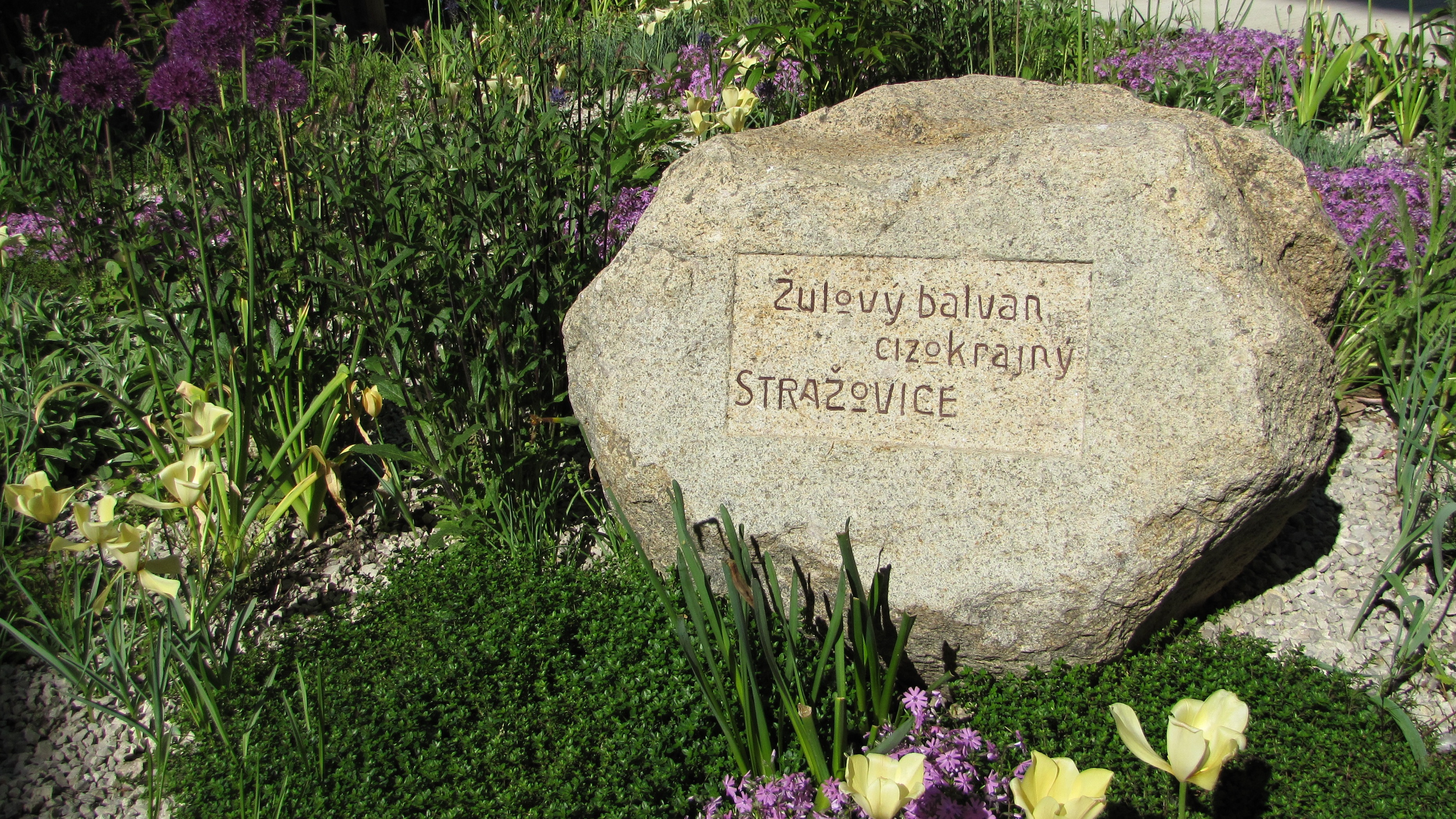 Bludný balvan před budovou Klvaňova gymnázia v Kyjově. Byl nalezen v sousední obci Stražovice. Nápis: Žulový balvan cizokrajný, Stražovice